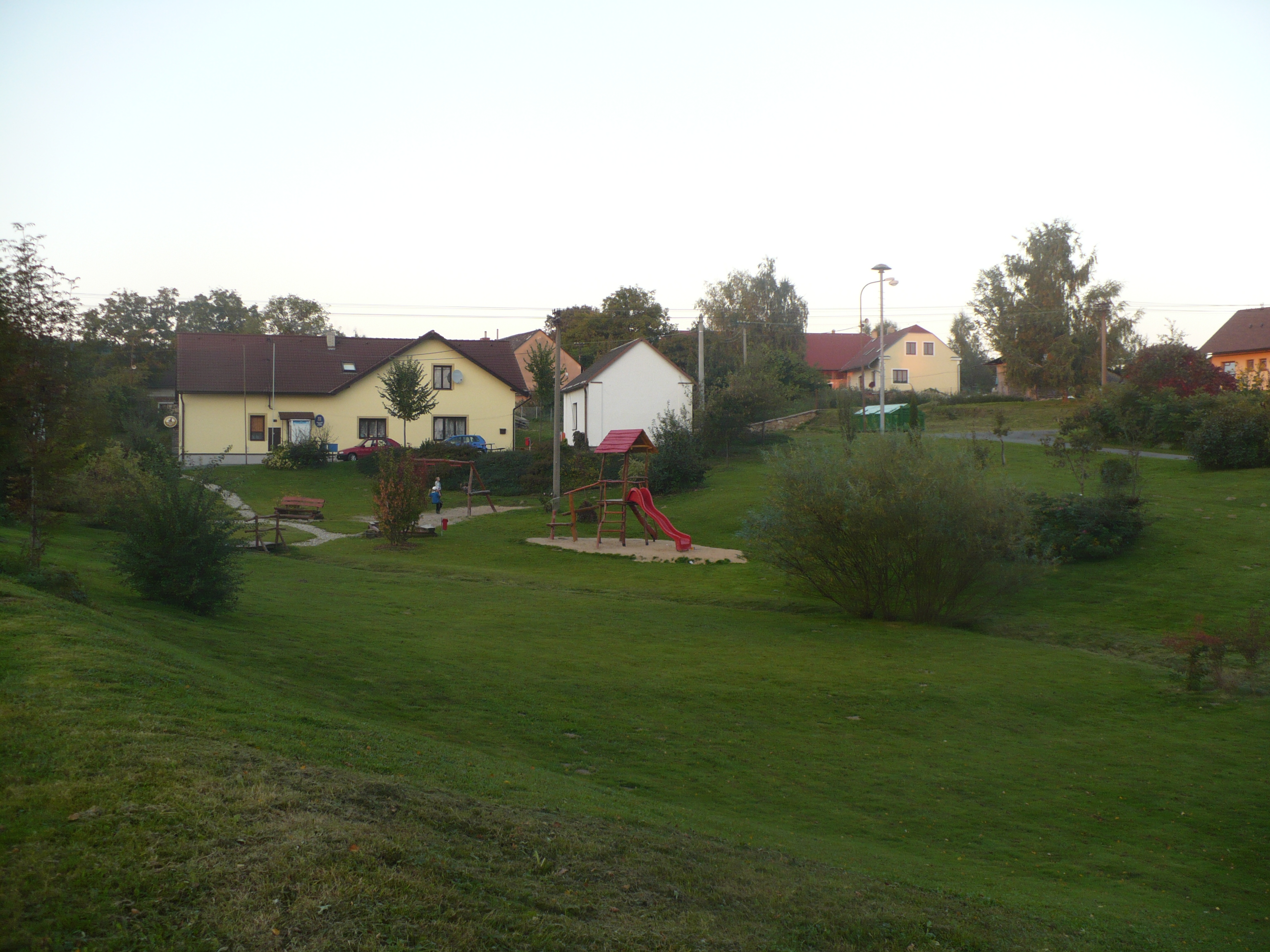 náves Anenská Studánka